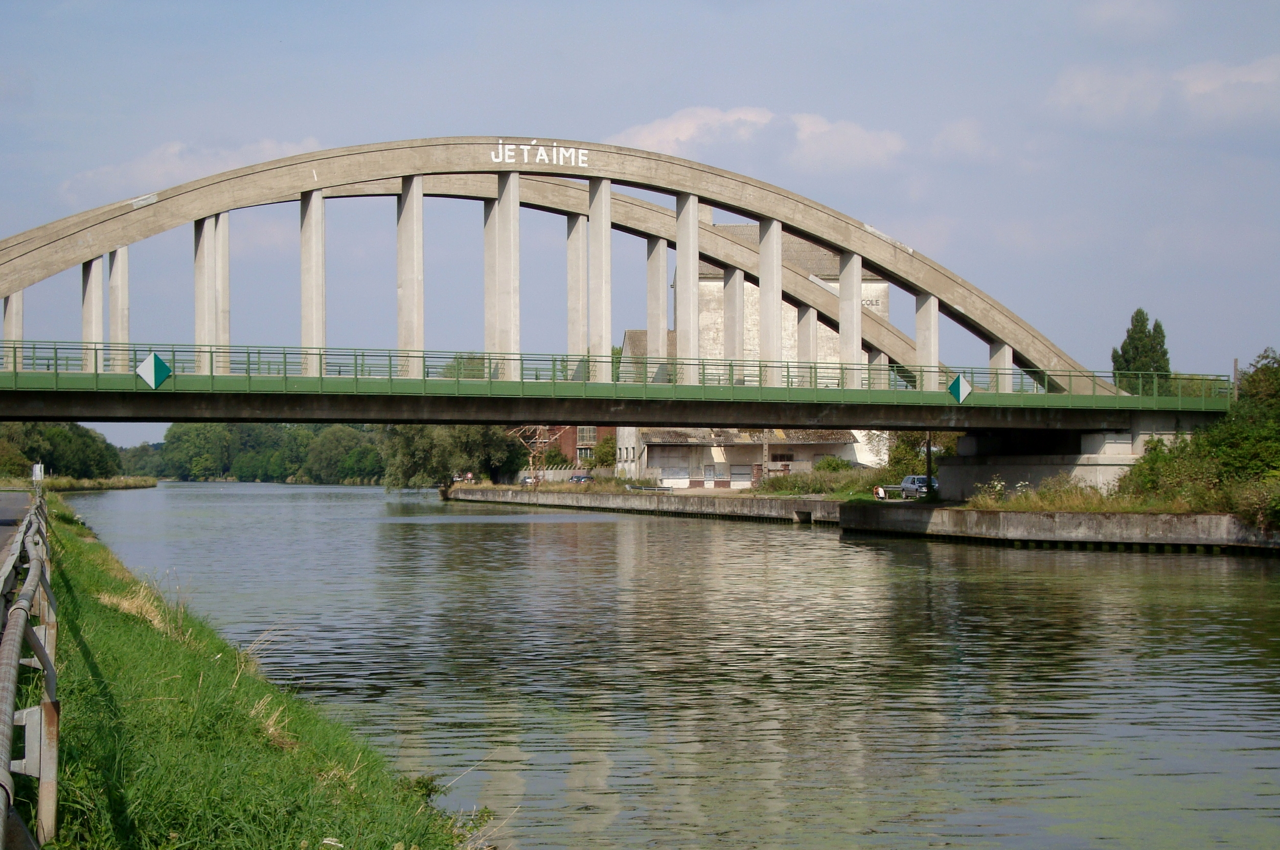 Un pont sur la Deûle dans le parc de la Deûle sur la D62 entre les communes de Gondecourt et de Wavrin (Nord).